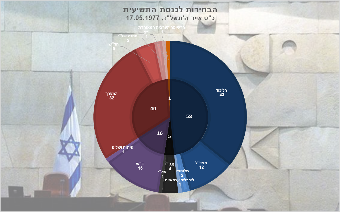 תוצאות הבחירות לכנסת התשיעית, בחירות המהפך